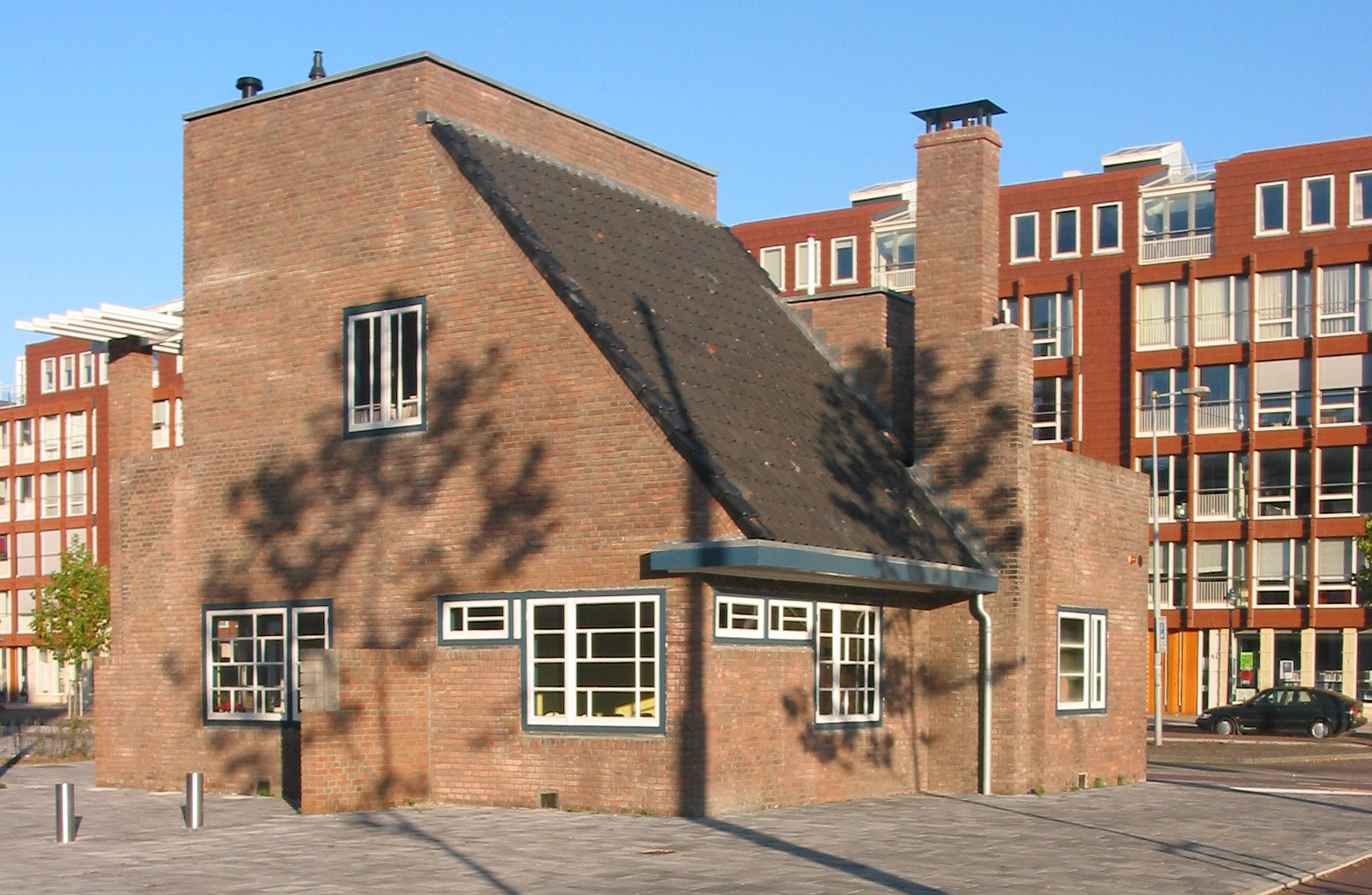 Noordelijk Olympiahuisje na verplaatsing.